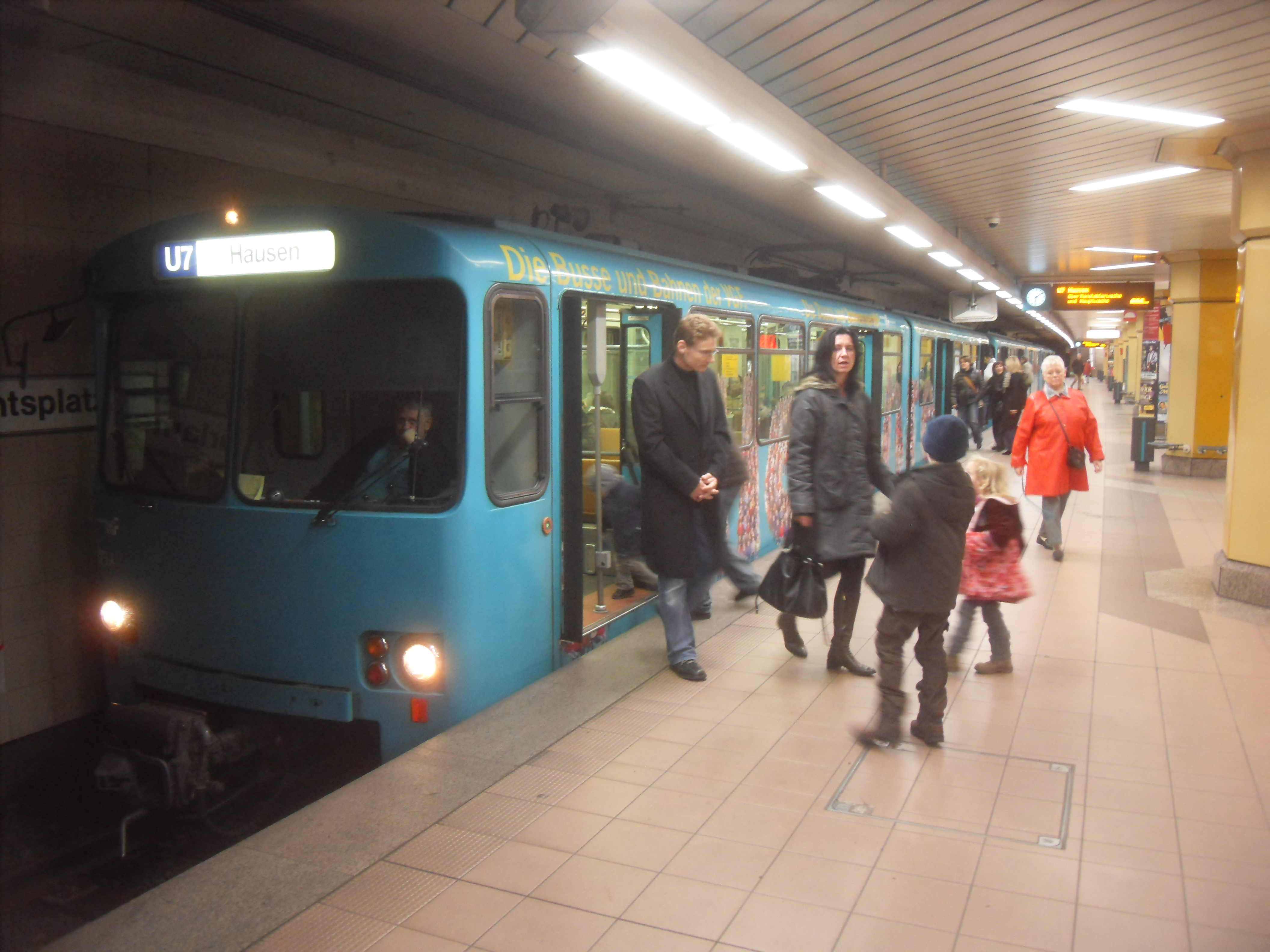 U 2-Triebwagen der U-Bahn Frankfurt im U-Bahnhof Parlamentsplatz auf der Linie U 7 auf dem Weg nach Frankfurt-Hausen in Hessen (Deutschland)